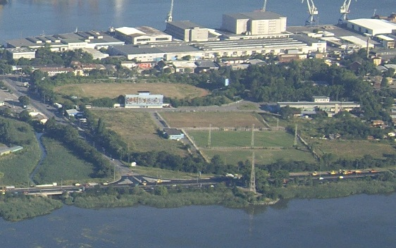 Burgas, Bulgarien: Der Abfluss (Burgas-Fluss) des Burgas-Sees und die Nehrung Komluka mit dem Station Tschernomorez rechts davon. Im Vordergrund der Burgas-See, im Hintergrund das Schwarze Meer